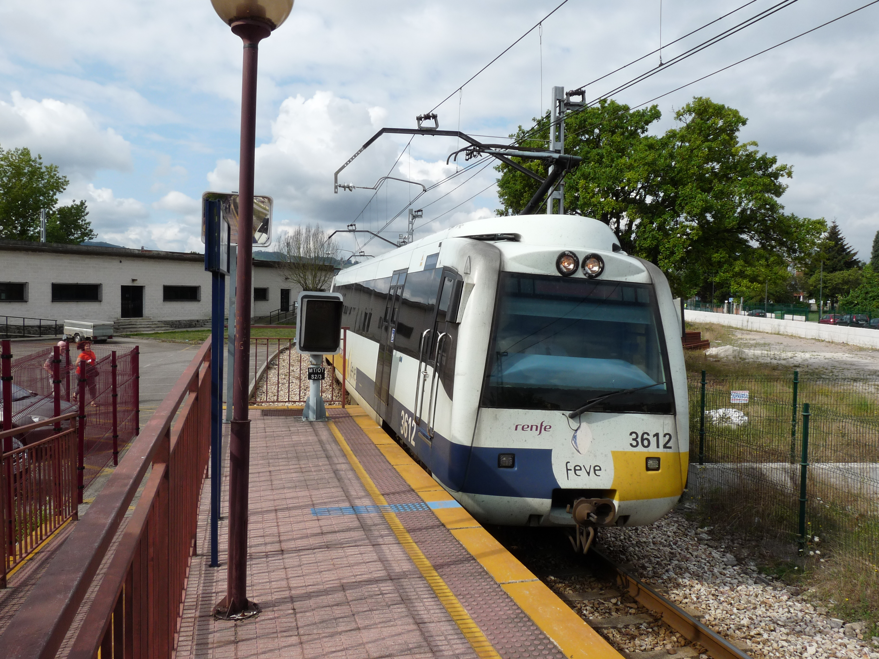 Sneldienst Oviedo Gijon in de bocht